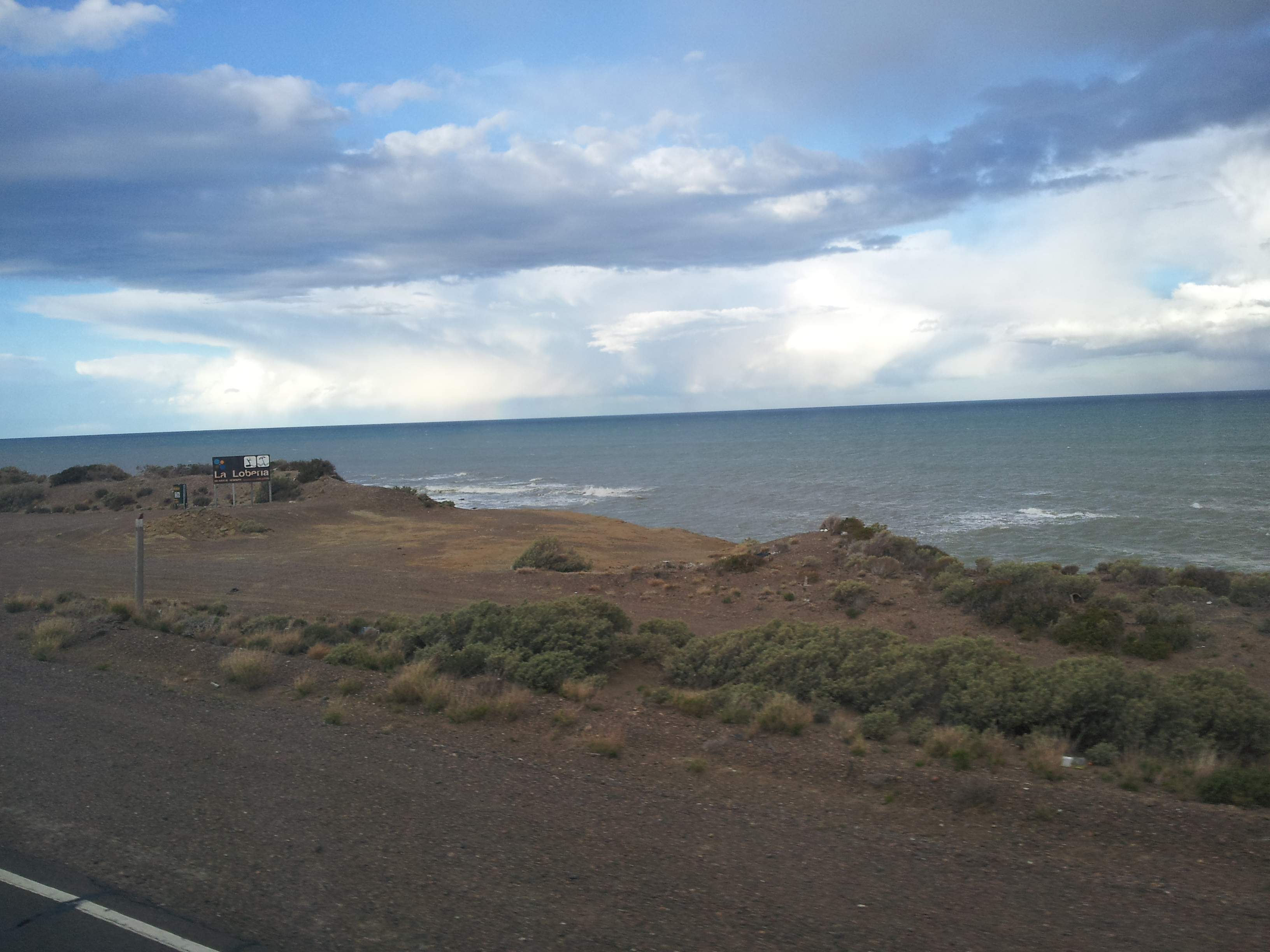 Vista playa La Loberia (Santa Cruz)